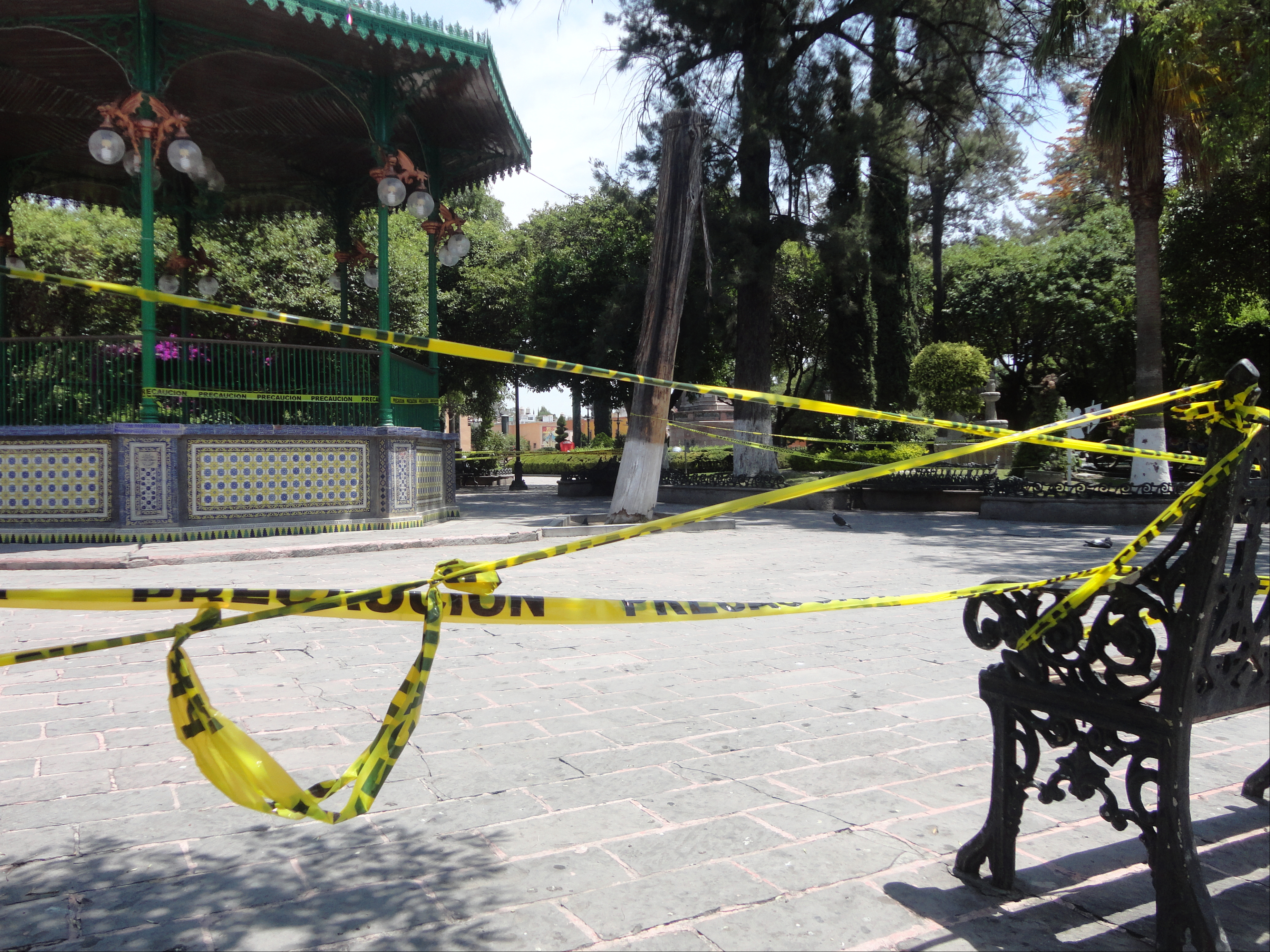 Dolores Hidalgo, Guanajuato, México. Manejo por distanciamiento social durante la pandemia de coronavirus SARS-CoV-2. Abril 2020.